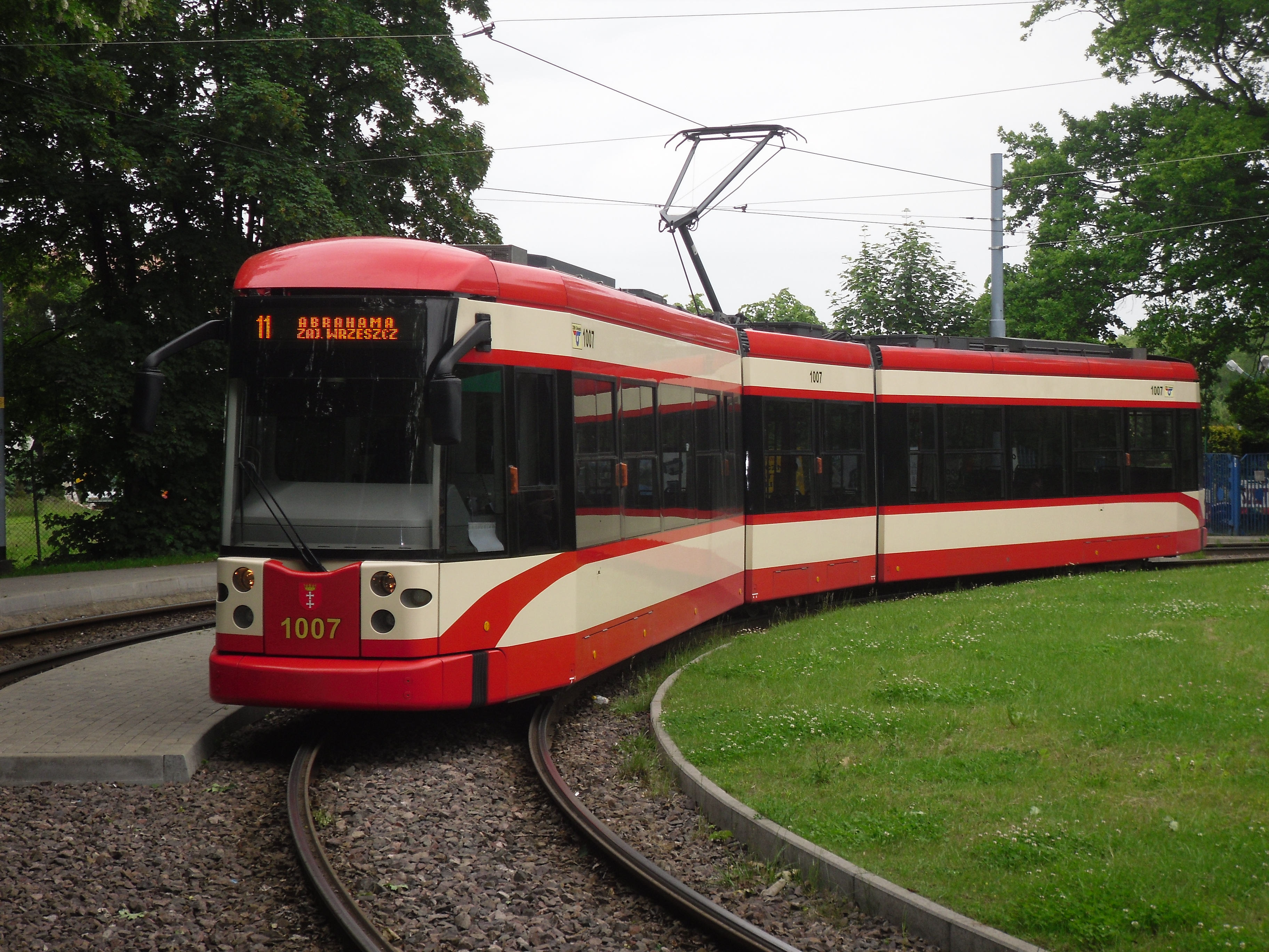 Tramwaj Bombardier NGT6/2 na pętli Abrahama (Gdańsk-Strzyża).